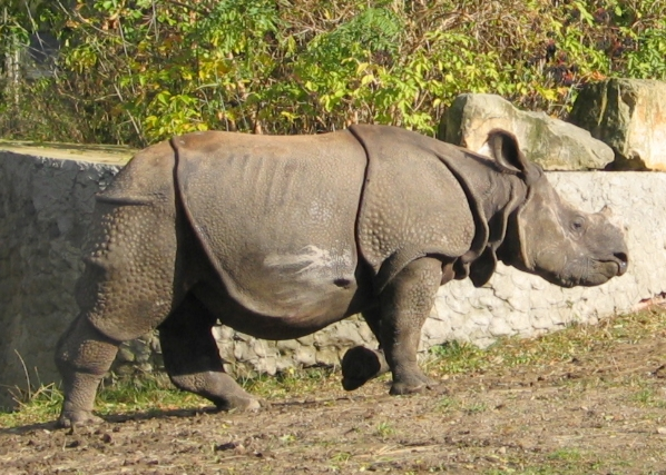 Nosorożec indyjski; zdjęcie udostępnione przez Dixi (c) 2005 na bazie GNU FDL Imported from wikipedia here by Christophe cagé 16:48, 1 November 2006 (UTC)